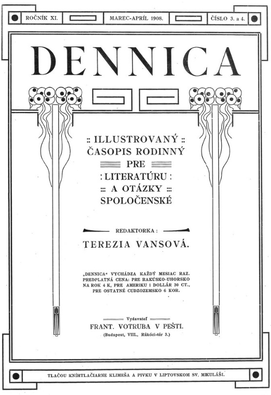 Titulný list slovenského časopisu pre ženy z 19. storočia